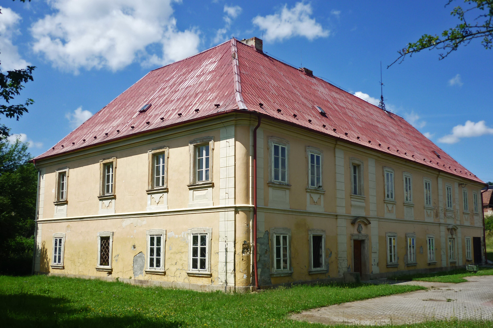 Schloss Skyrl / Škrle